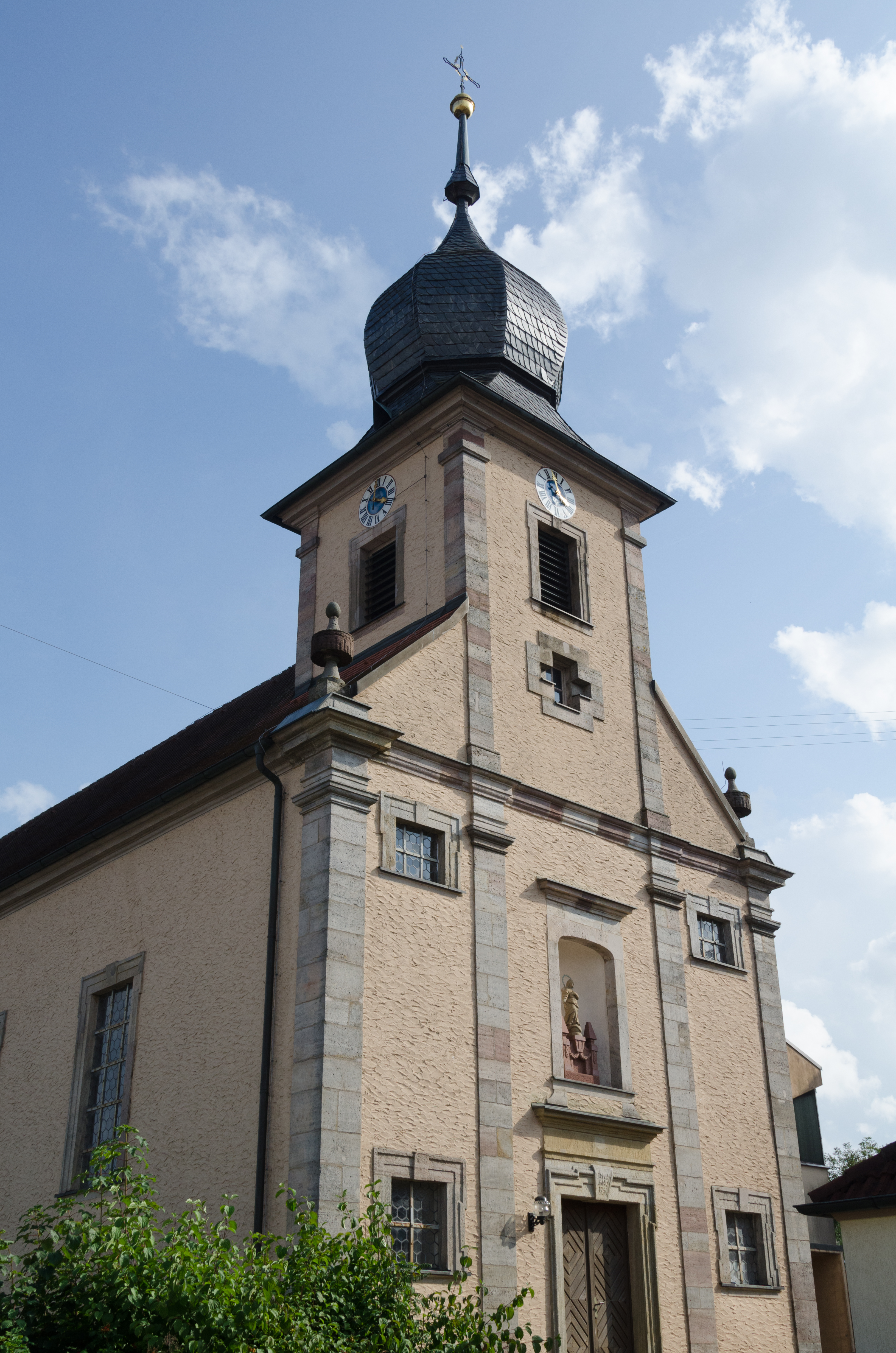 Burkardroth, Waldfenster, Kath. Pfarrkirche